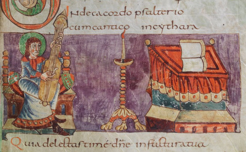 Stuttgarter Psalter - Cod.bibl.fol.23: Miniatur auf 108r